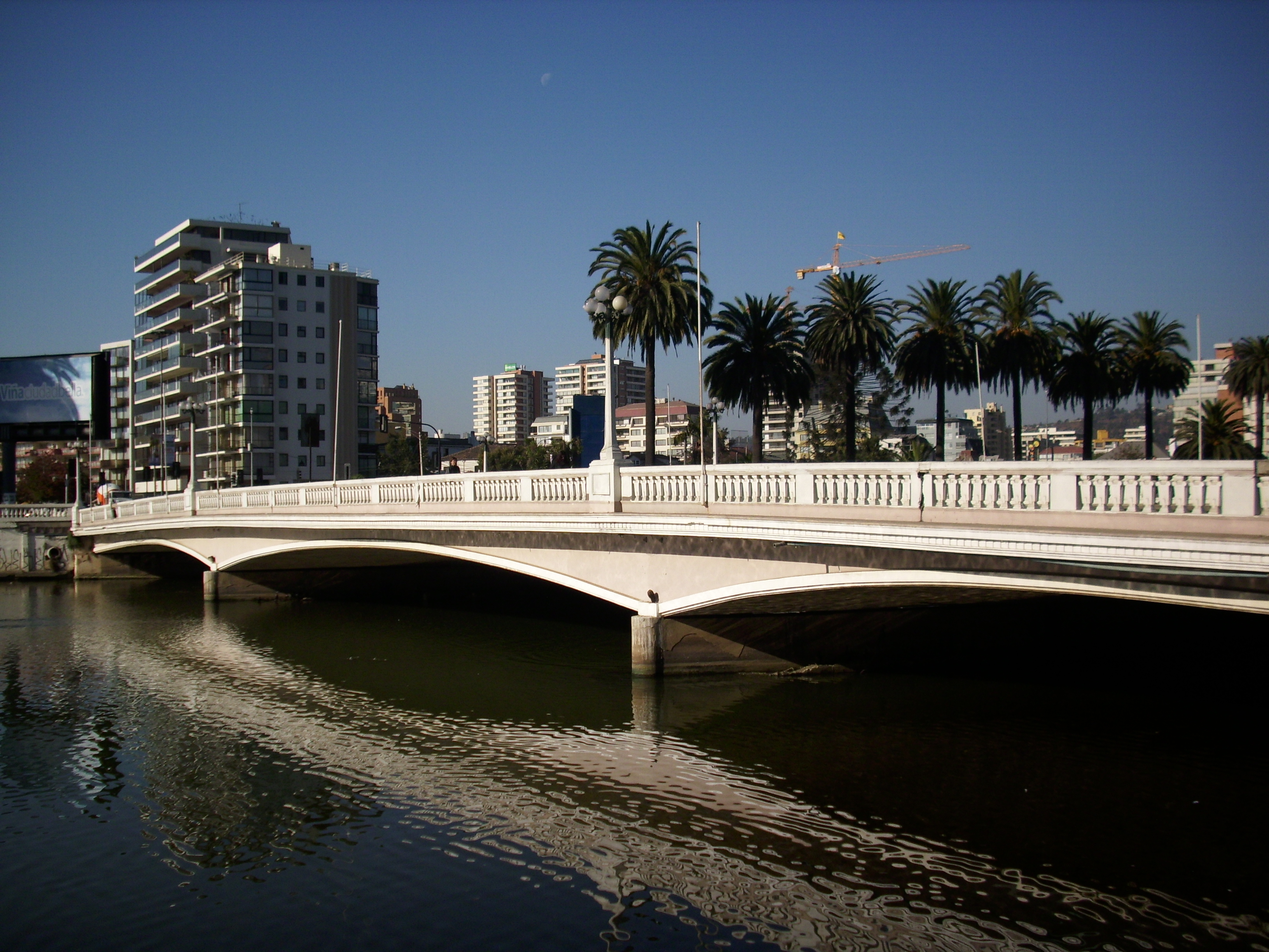 El puente Casino, que cruza el estero Marga Marga. Viña del Mar, Chile, 22 de abril de 2010.